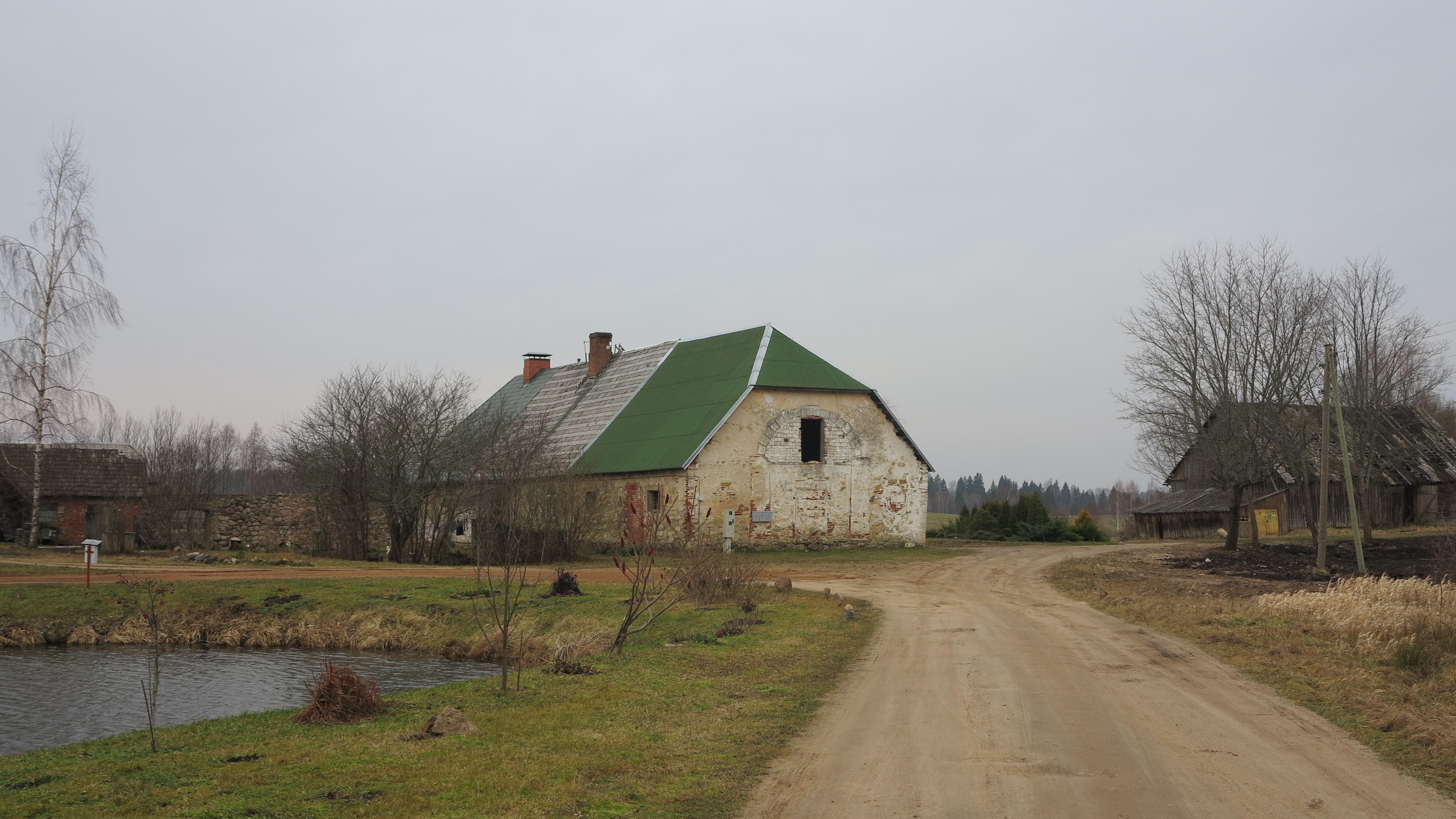 Drabeši mõisa kõrvalhoone 2013. aastal (4).